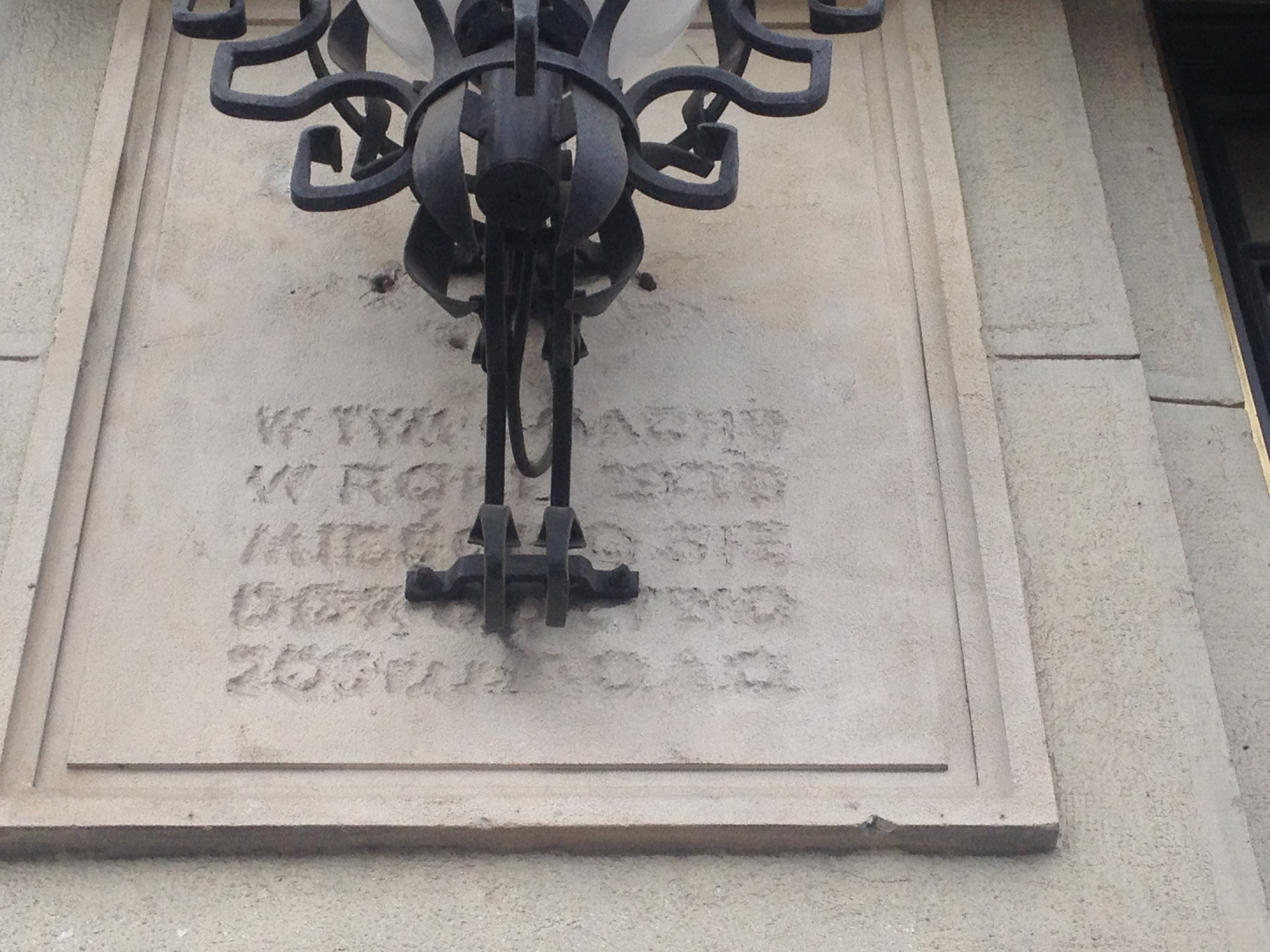 Меморіальна дошка